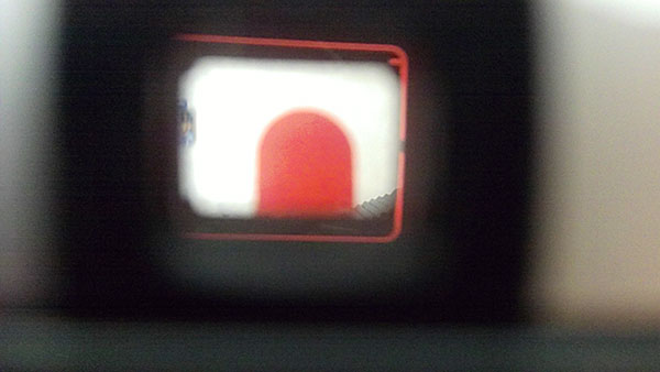 Предупреждающий красный флажок в окне видоискателя фотоаппарата Olympus Trip 35 сигнализирует о недостаточной освещённости сцены и блокировке спуска.